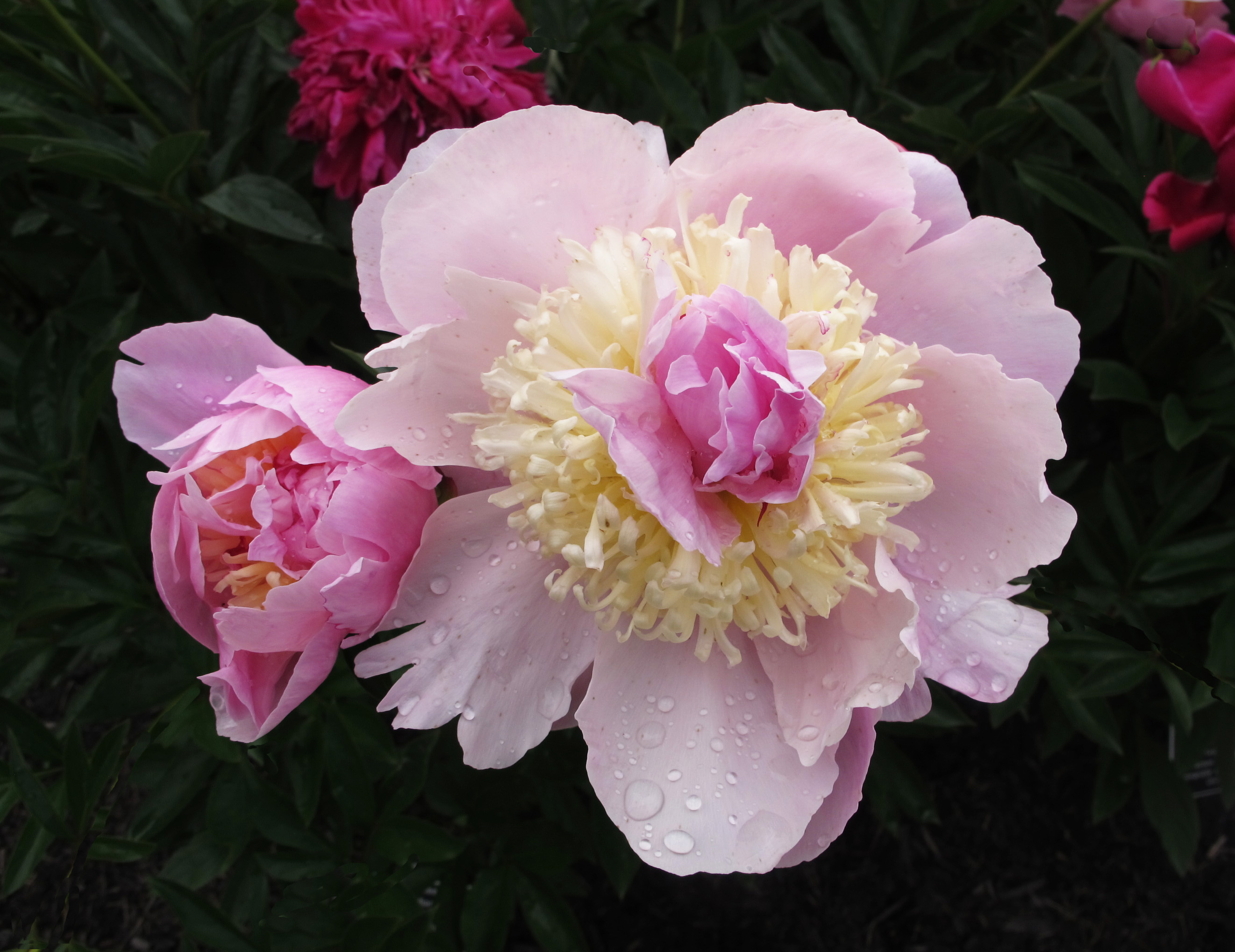 Paeonacées, Paeonia lactiflora Pall. 'Isabella'. Pivoine de Chine. Collection Alphonse Desjardins. Commandite de la Caisse Desjardins, Université Laval. Jardin universitaire Roger-Van den Hende, 2460, boulevard Hochelaga, Québec, Canada.